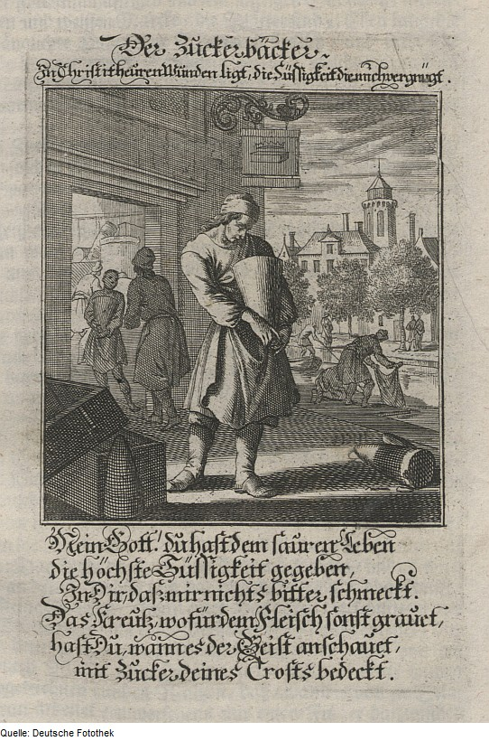 Original image description from the Deutsche Fotothek Ständebuch & Beruf & Handwerk & Bäcker